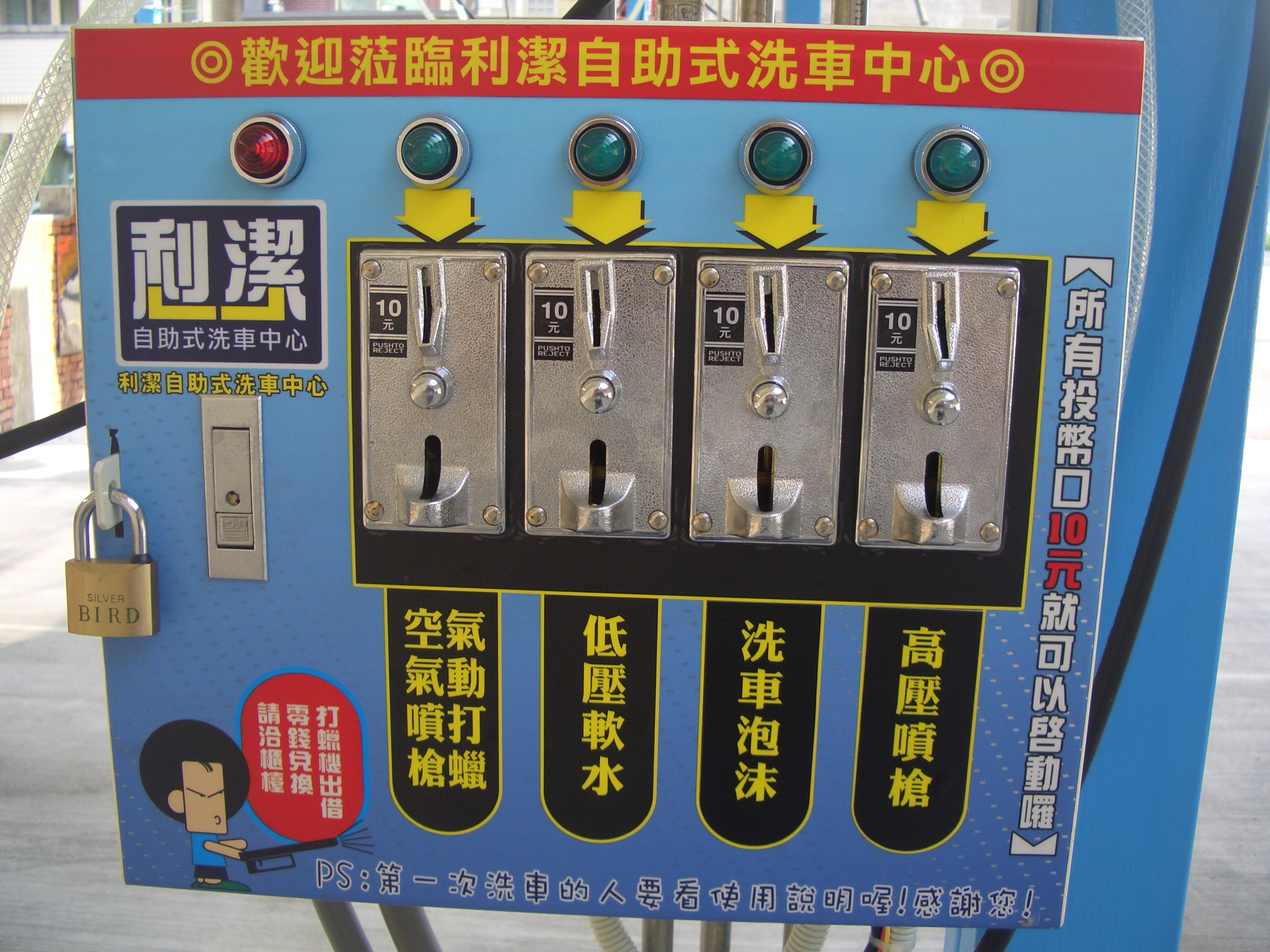 利潔投幣式自助洗車 新竹縣竹北市勝利六街112號 03-5500989